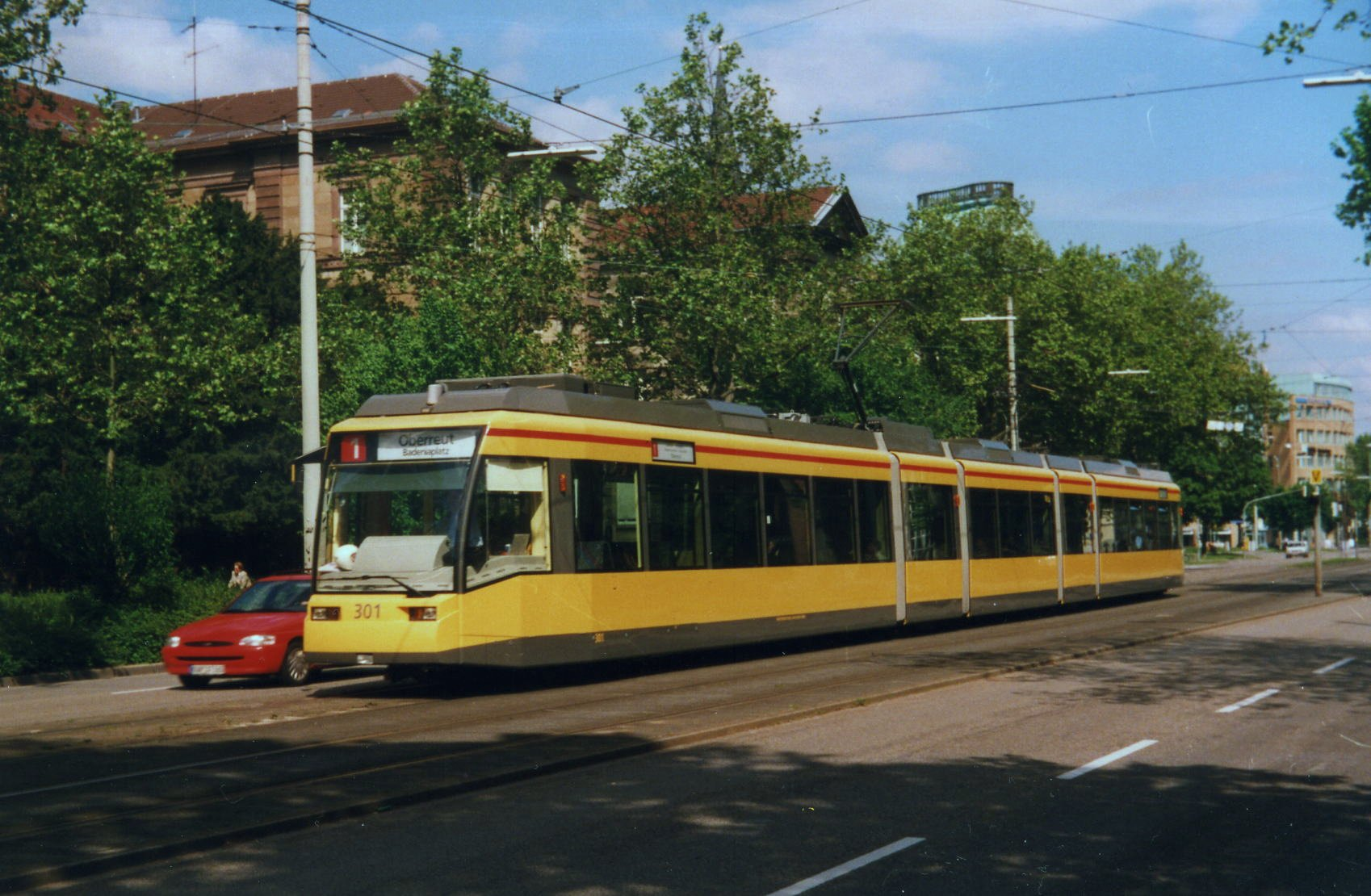 Straßenbahn-Niederflur-Triebwagen Nr. 301 der Karlsruher Straßenbahn in der Karlsruher Kaiserallee